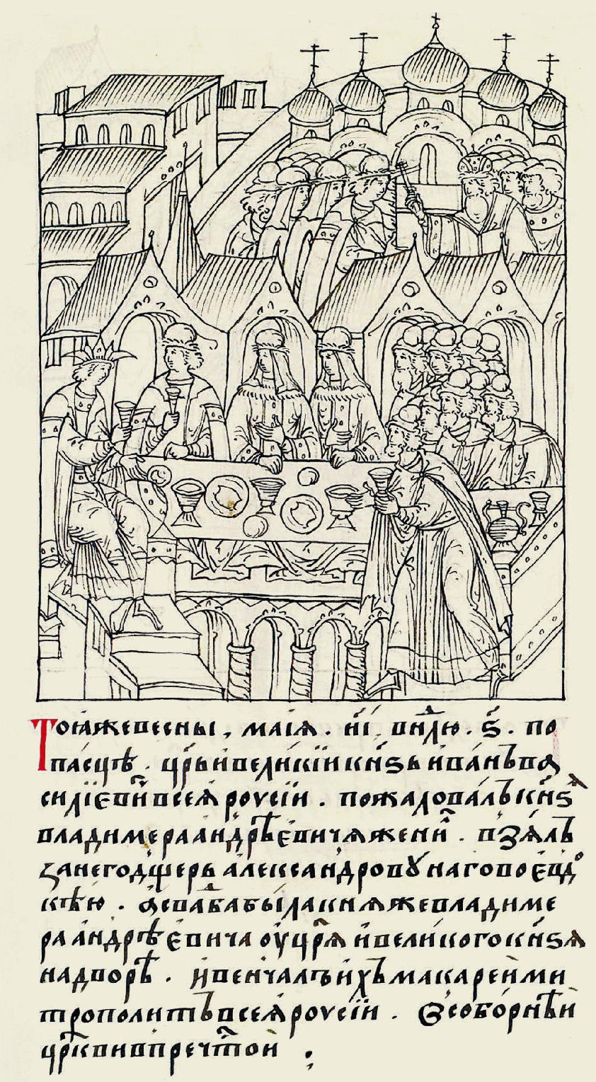 В ту же весну (ме- сяца) мая в 18 (день), в шестое воскресенье после Пасхи, царь и великий князь Иван Василье- вич всея Руси пожало- вал князя Владимира Андреевича, женил его, взял за него дочь Александра Нагого Ев- докию; а свадьба князя Владимира Андрееви- ча проходила на дворе у царя и великого князя, и венчал их Макарий, митрополит всея Руси, в соборной церкви Успения (Пре- святой) Богородицы.